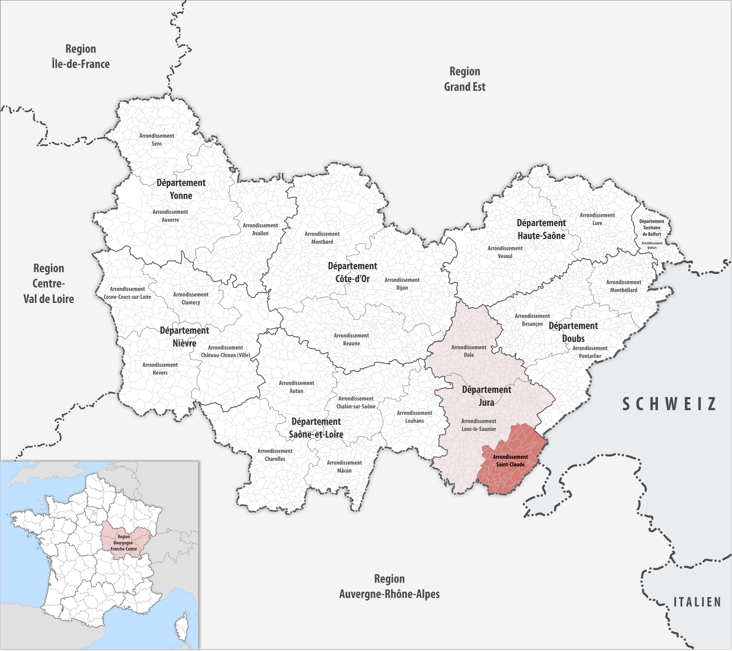 Lage des Arrondissements Saint-Claude